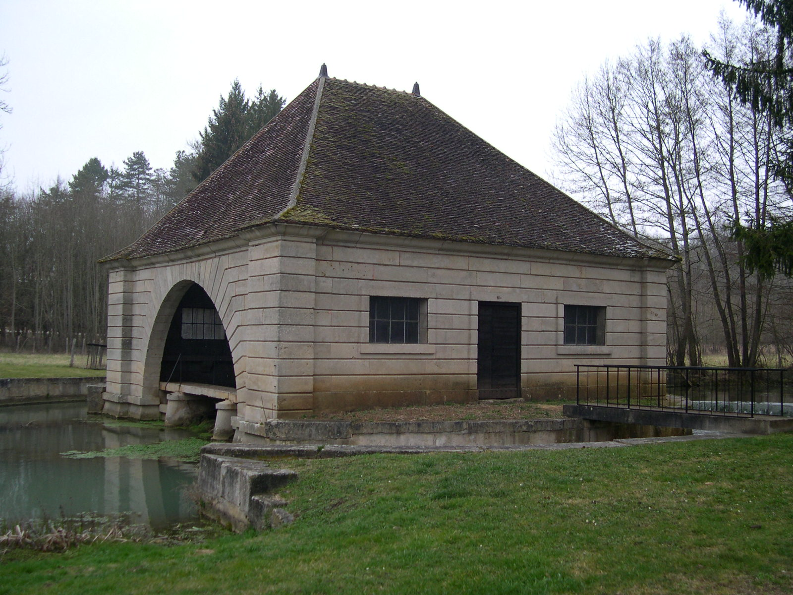 Lavoir de Voutenay sur Cure construit en 1829